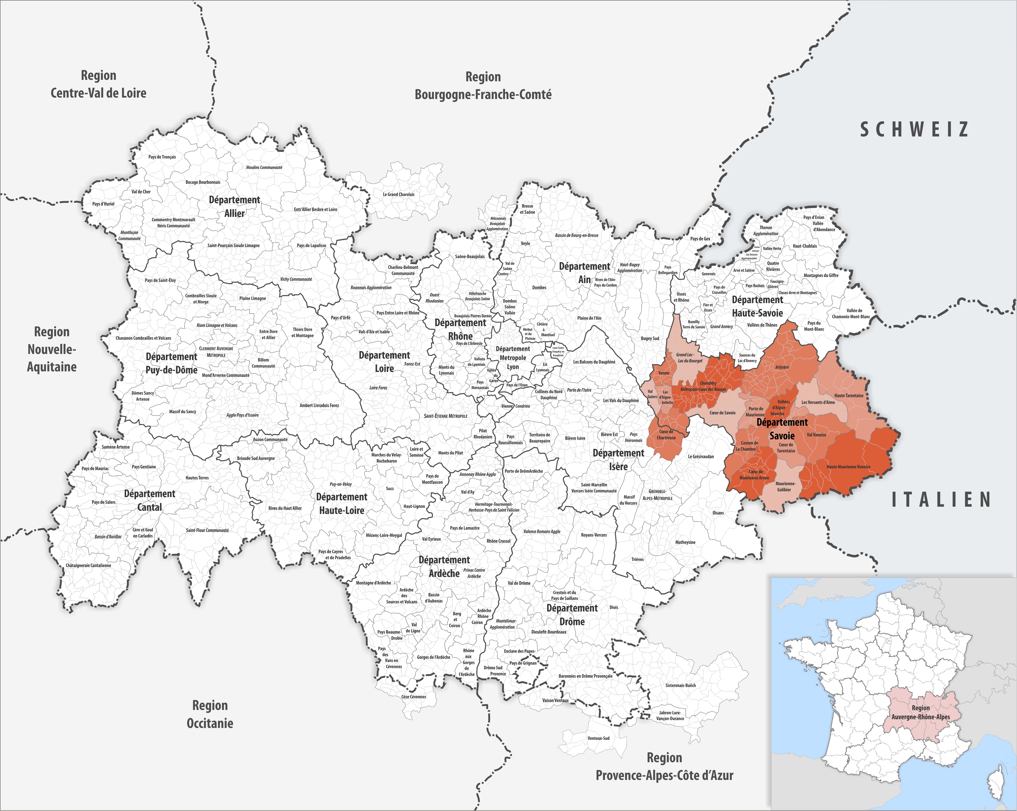 Gemeindeverbände im Département Savoie